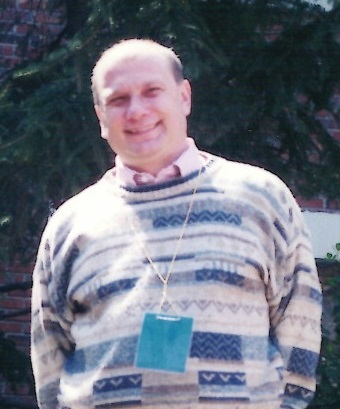 Milan Špaček (1998)